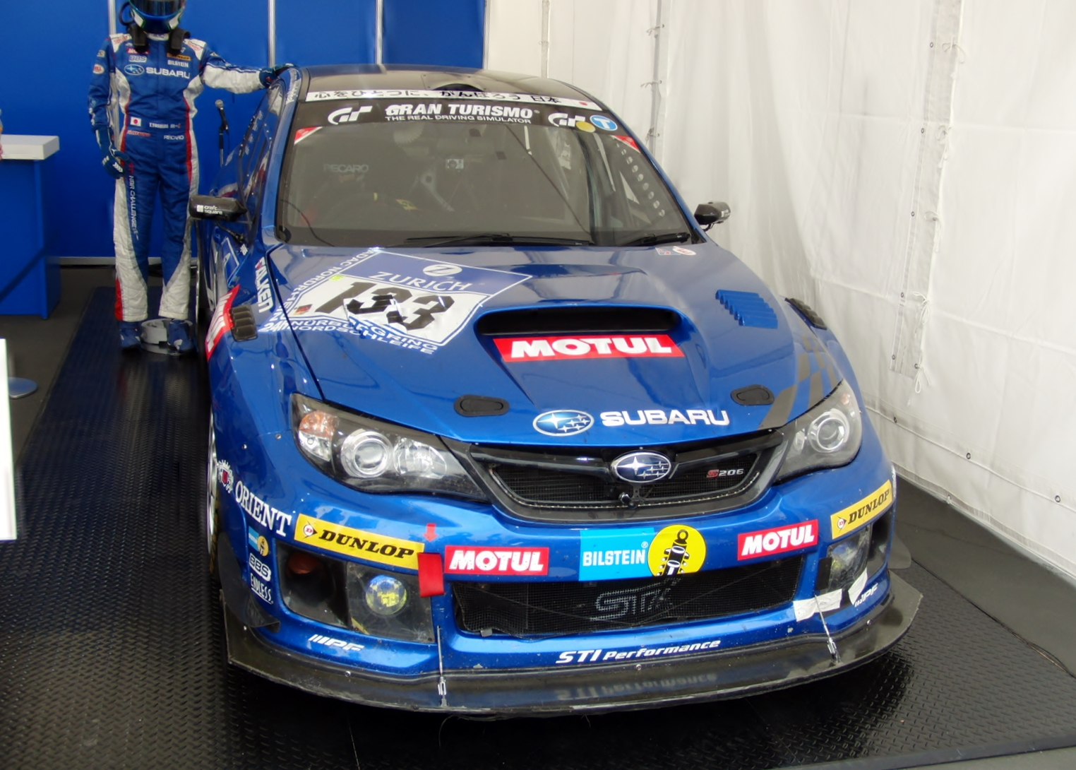 2012年度ニュルブルクリンク24時間レースに参戦したスバル・WRX STI S206を撮影。尚、後日みんカラでもアップ予定。